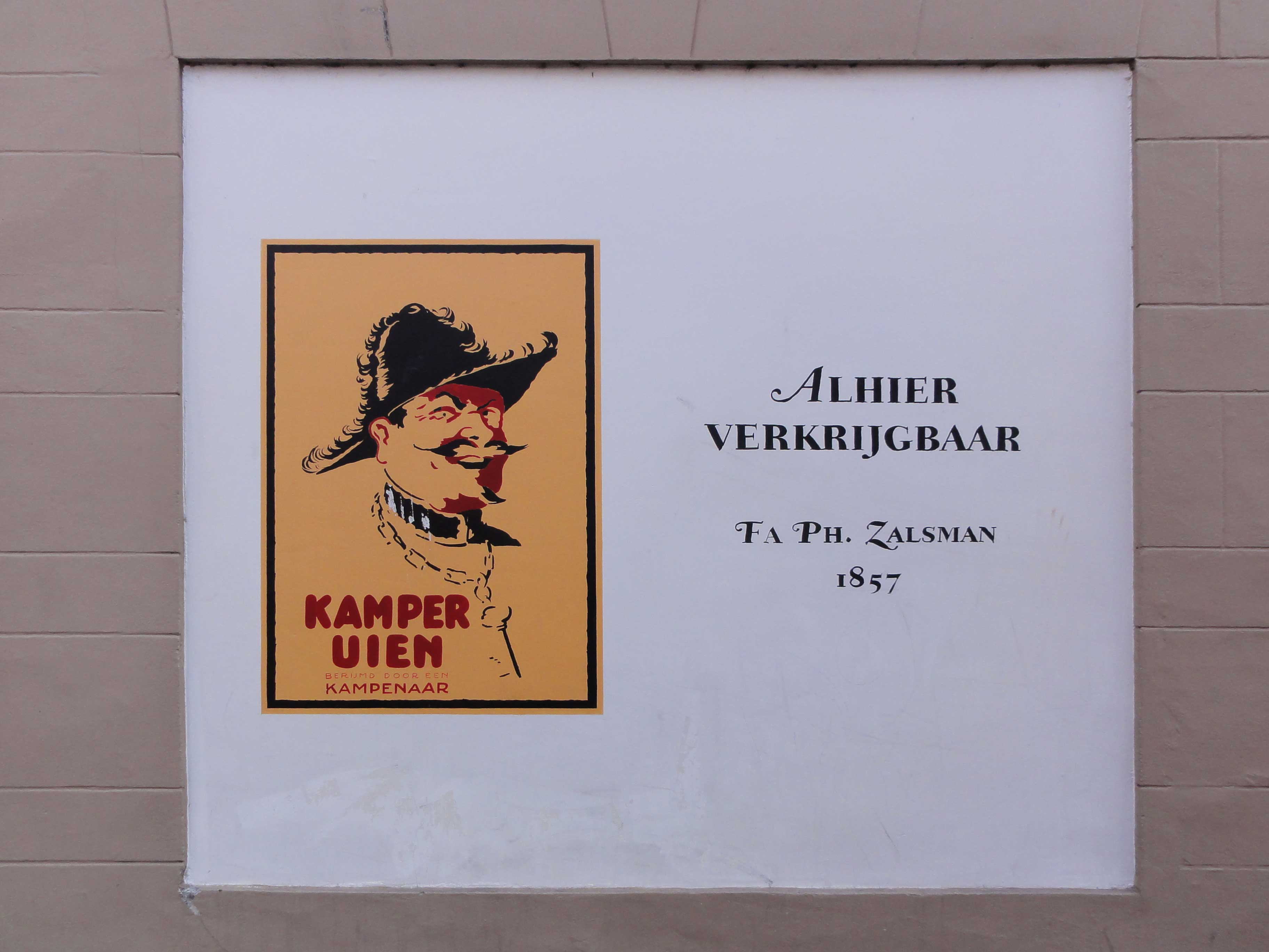 Muurreclame voor het boekje "Kamper uien" geschreven door door Jan Jacob Fels (1816-1883) in Kampen